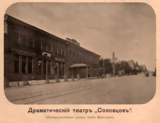 Театр Соловцова в Киеве, конец ХІХ века